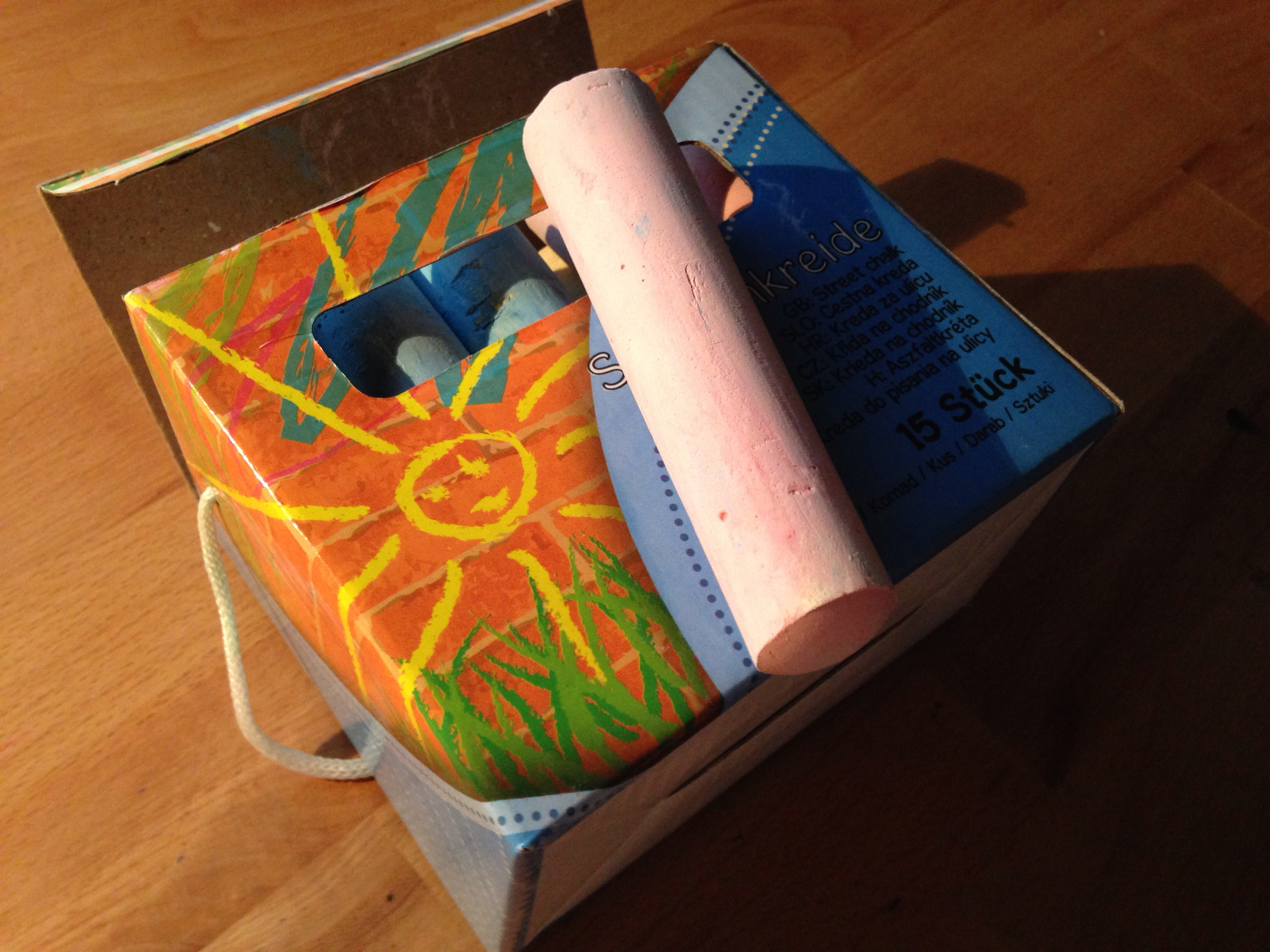 Straßenkreide